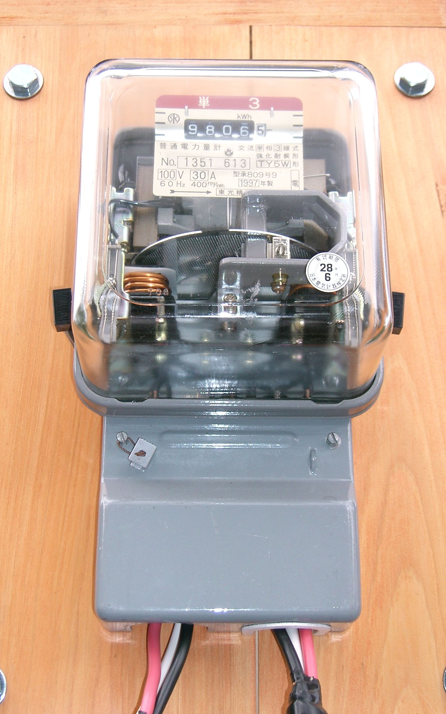 Electrical meter